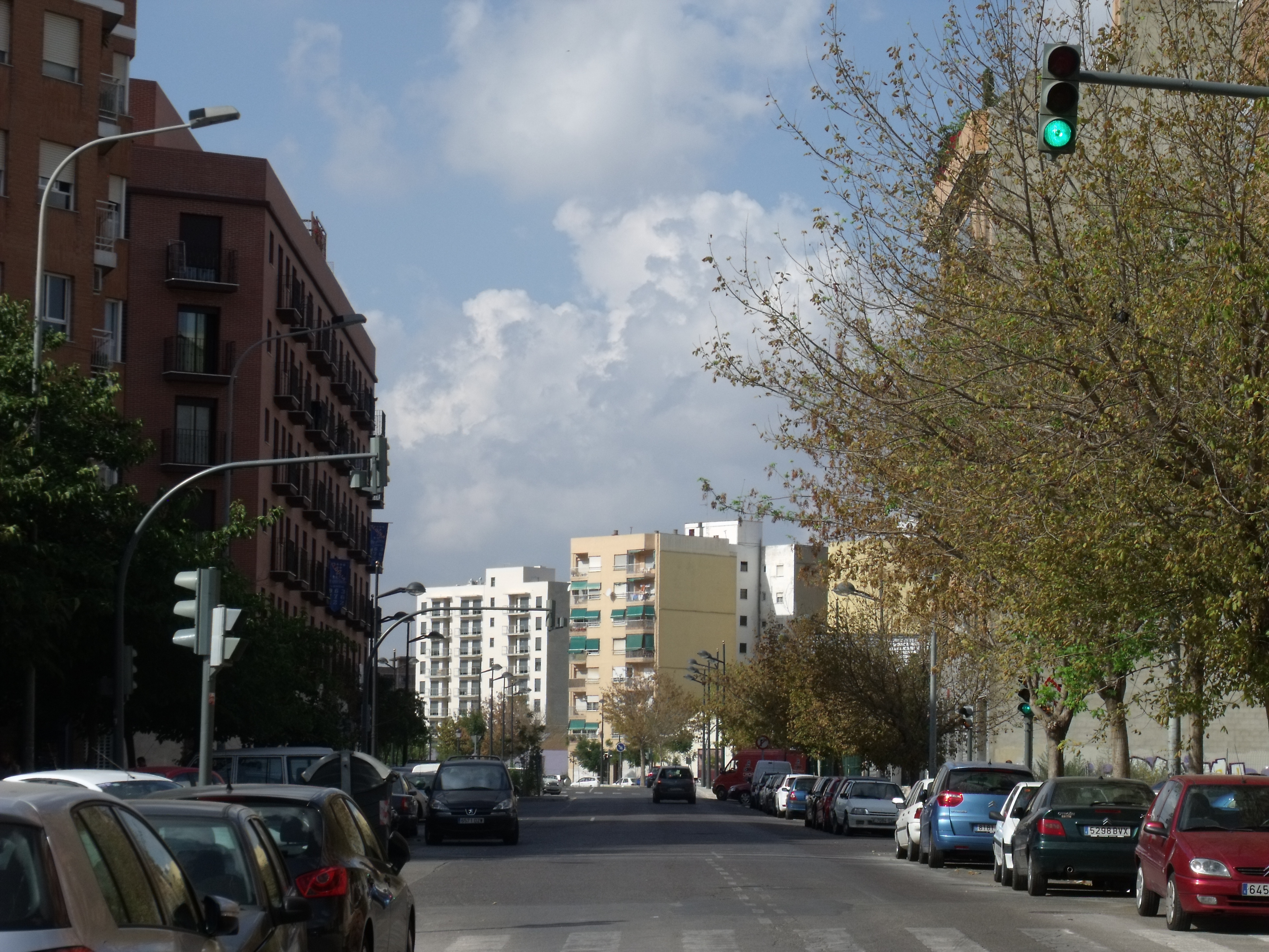 Calle Campos Crespo, en Valencia.